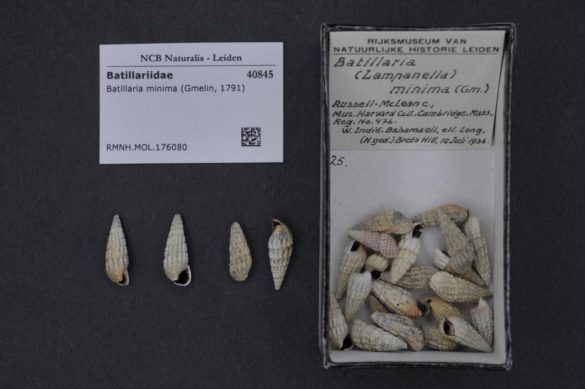 Lampanella minima (Gmelin, 1791)